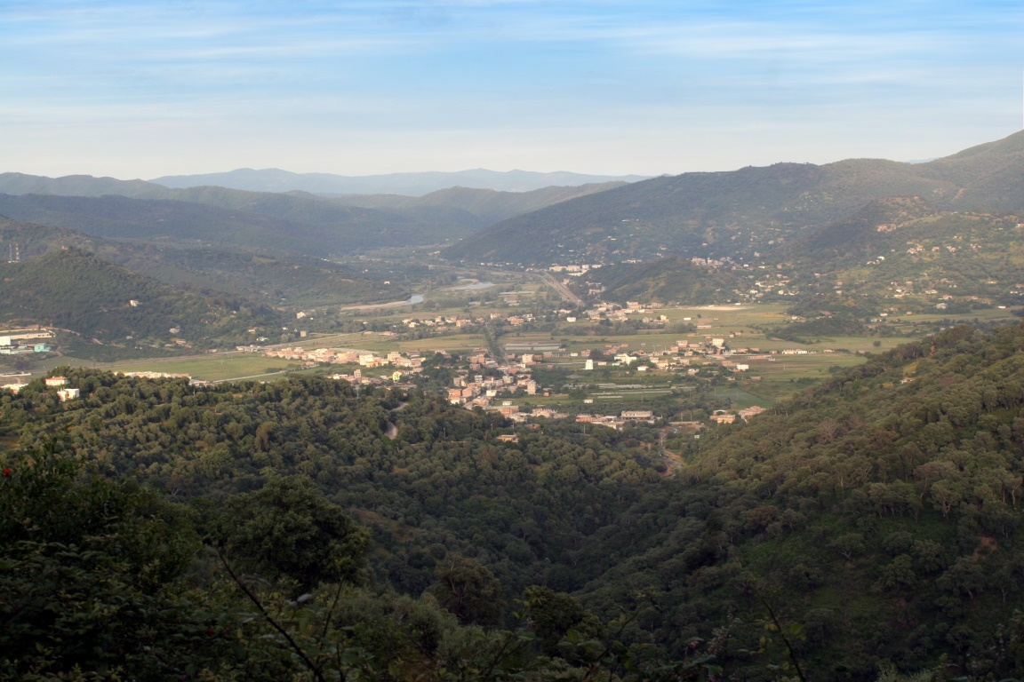 Vue générale de la commune de Djemaa Beni Habibi